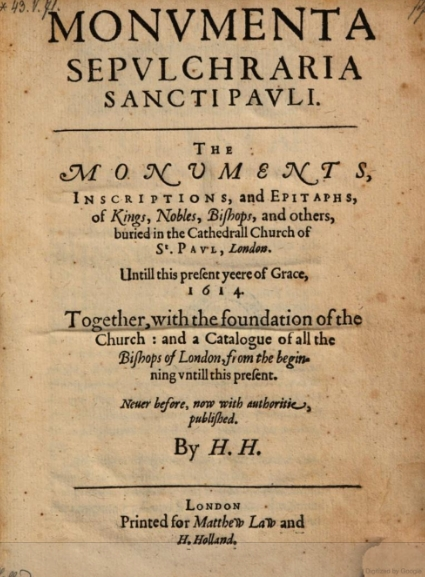 Title page of Monumenta_Sepulchraria Sancti Pauli